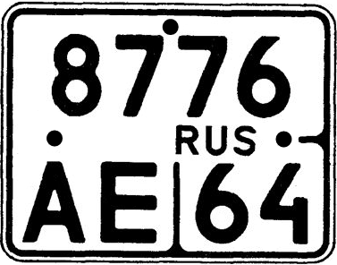 Государственный регистрационный знак для мотоциклов, моторолеров, мопедов и мотонарт.